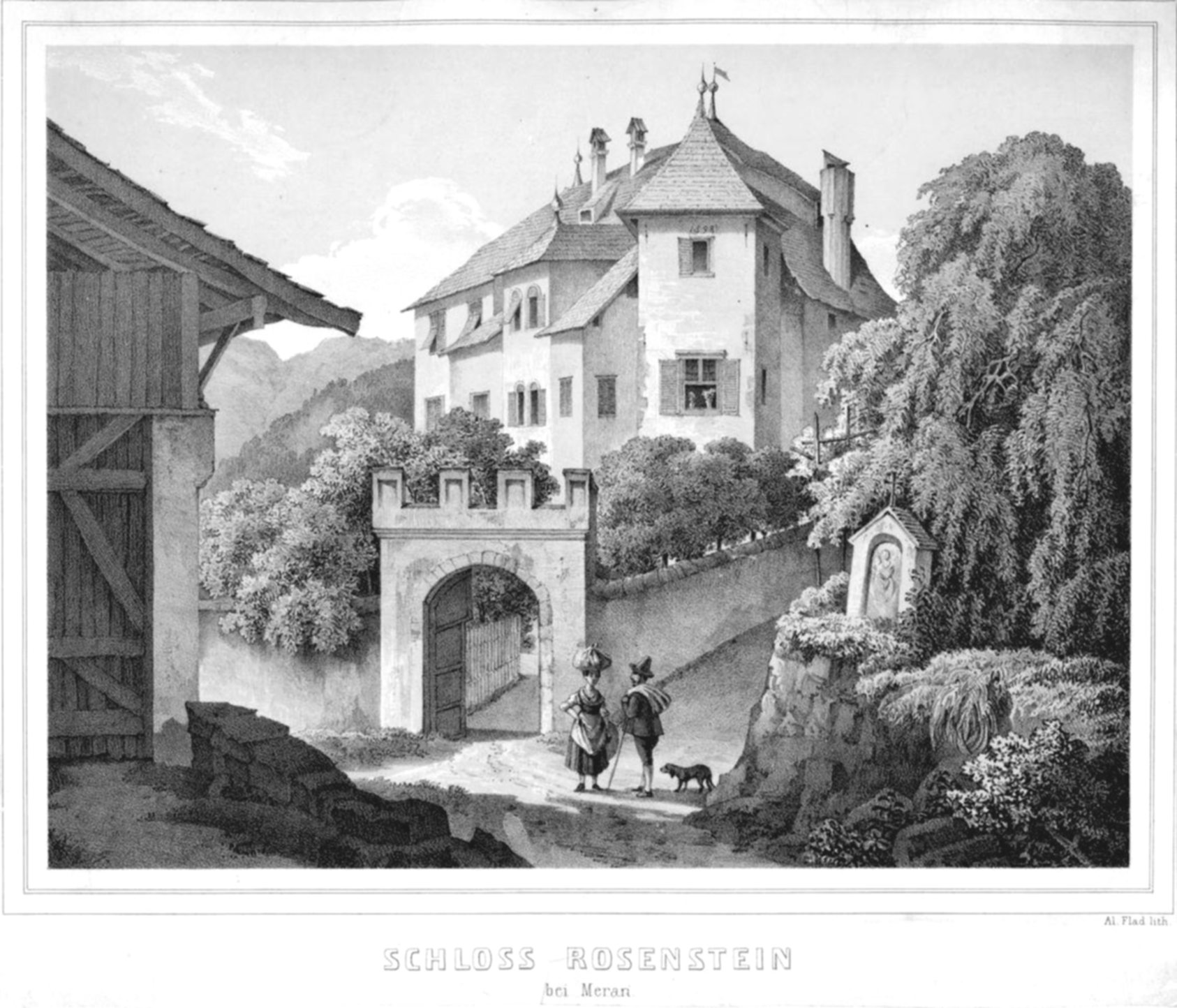 Lithografie von Alois Flad: "Schloss Rosenstein bei Meran", bezeichnet: Al. Flad lith., Blattgröße 27 cm x 20 cm